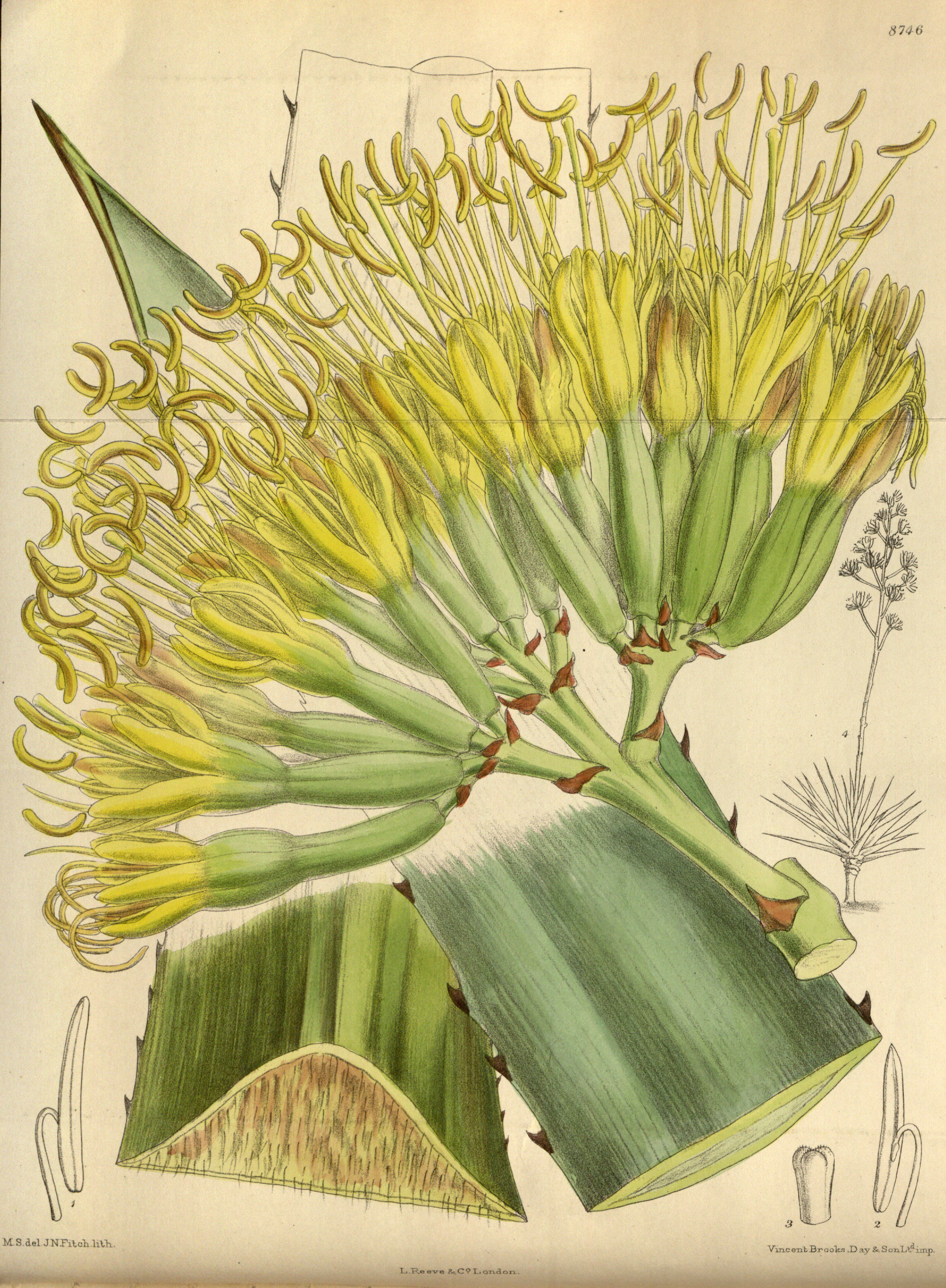 Agave fourcroydes, Asparagaceae, Agavoideae